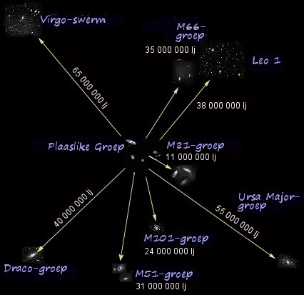 Plaaslike Groep se ligging in die Plaaslike Superswerm